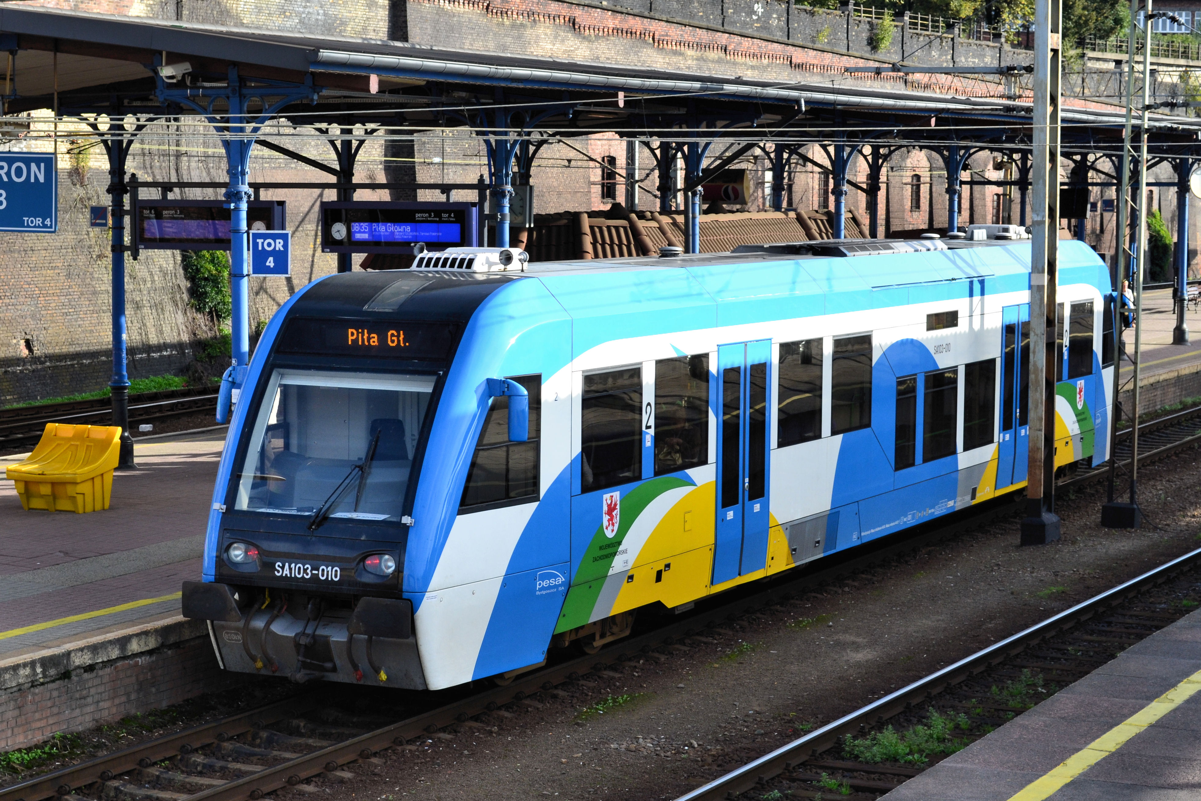 Szynobus PESA 214Ma (SA103-010)